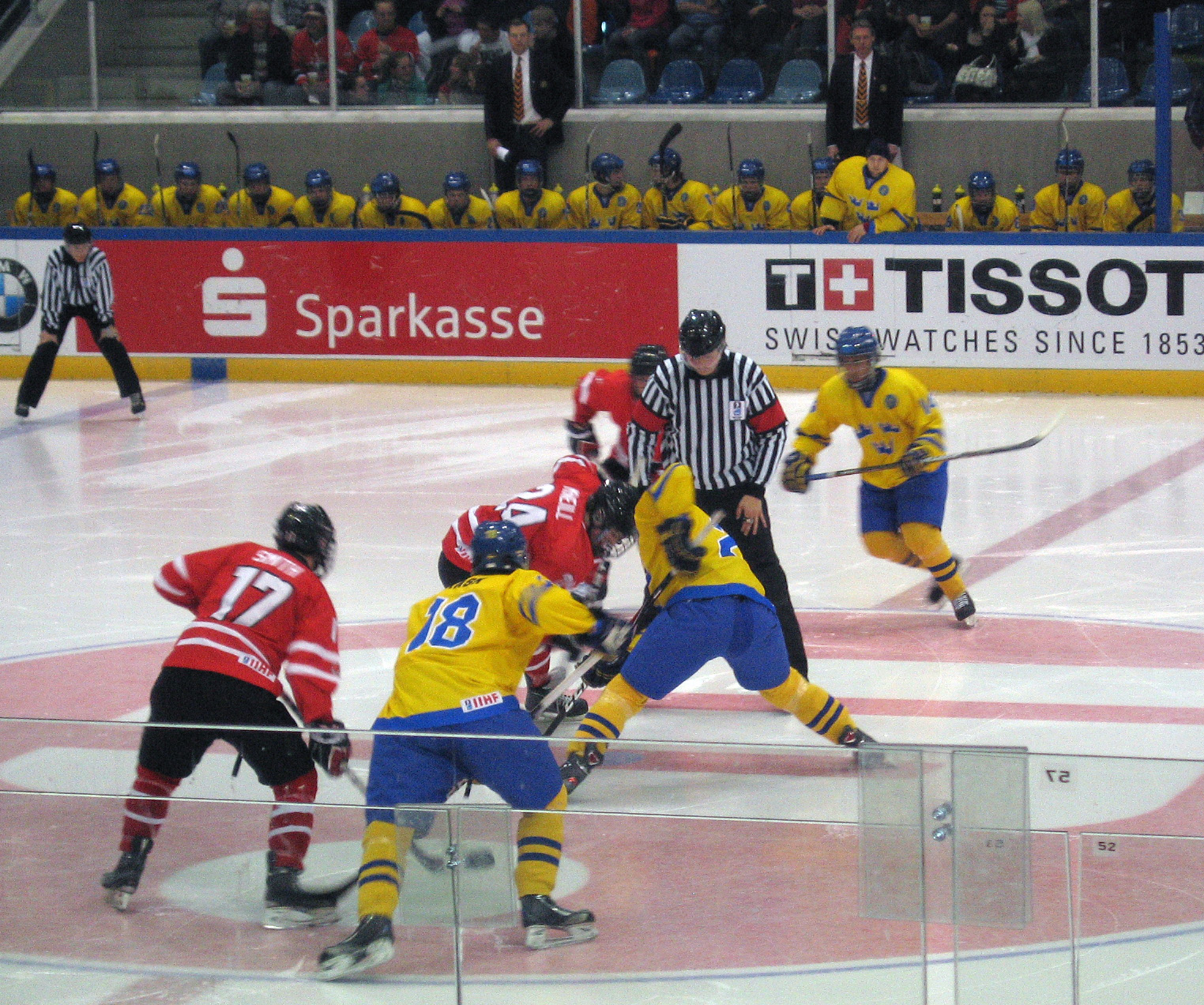 IIHF U18 WC 2011, Group B, Sweden vs. Canada 4:2, EnergieVerbund Arena, Dresden